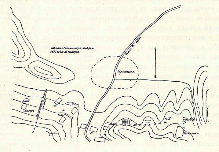 позициите при Орхание